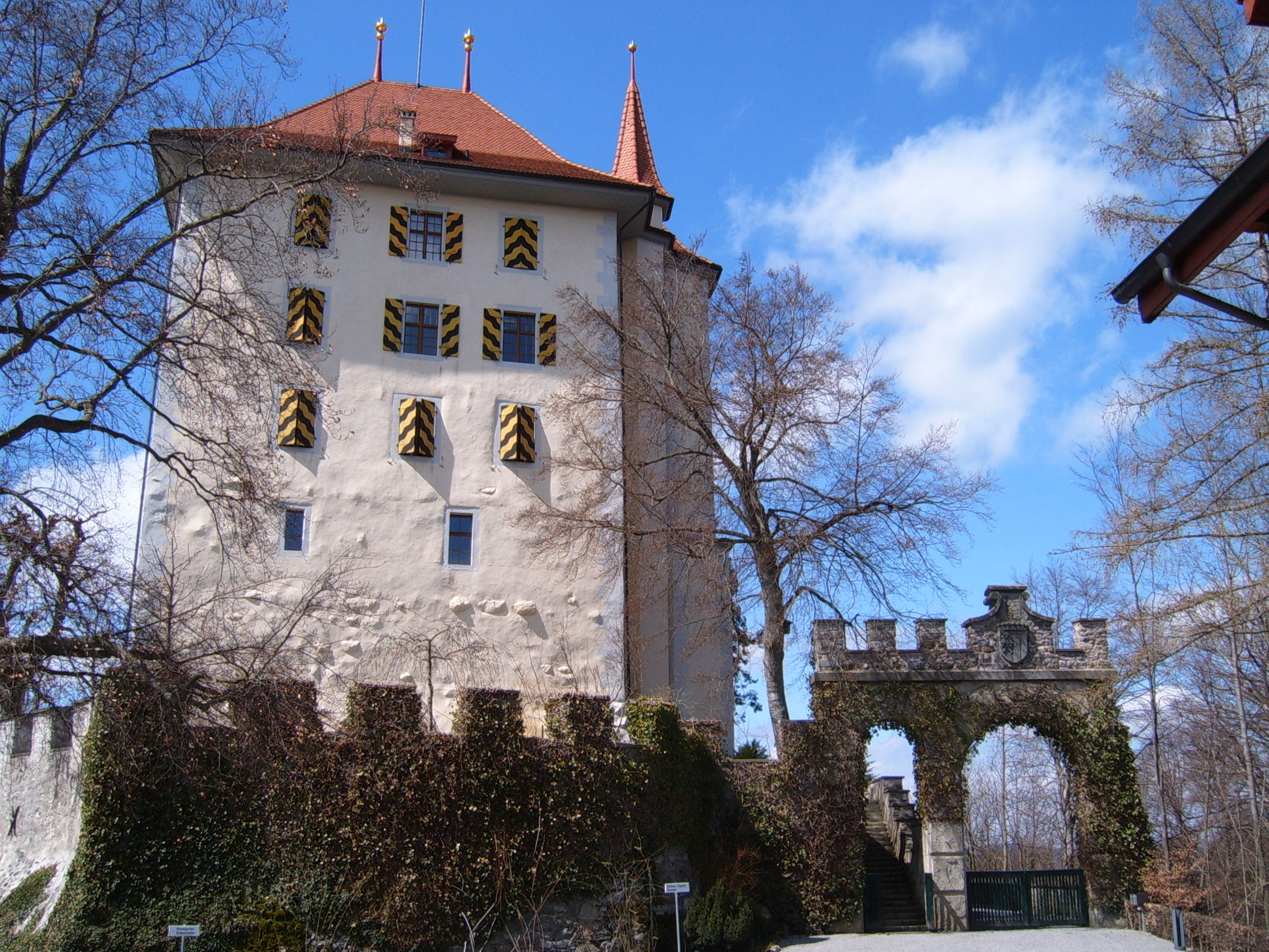 Schloss Heidegg, Canton of Lucerne, Switzerland Photographer: Markus Bernet Date: 04/14/2006